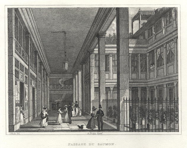 Gravure du Passage du Saumon (actuel Passage Ben-Aïad), 1840